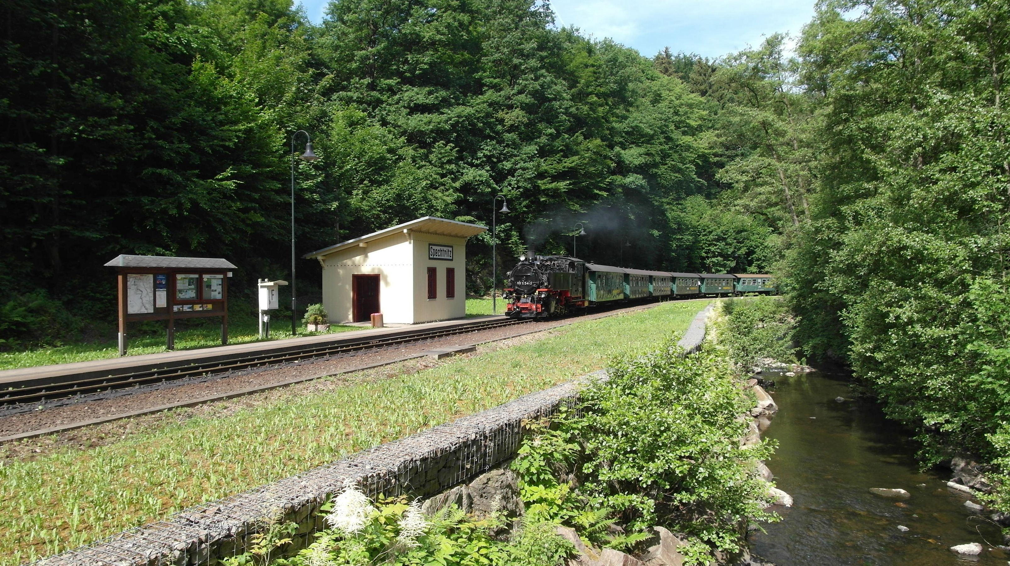 09.06.2017 01734 Spechtritz (Rabenau): Haltepunkt Spechtritz (GMP: 50.952603,13.638735) der Weißeritztalbahn unmittelbar am Ufer der Roten Weißeritz. Einfahrt der Dampflok 99 1734-5 mit einem Personenzug. Am 30.10.1882 wurde die Schmalspurbahn Haisberg-Kipsdorf eröffnet. Schon 1897 war sie durch Hochwasser zerstört worden. Nach dem Hochwasser vom August 2002 begann am 13.12.2008 auf dem Teilstück zwischen Freital und Dippoldiswalde wieder der Fahrbetrieb. Ab dem 17. Juni 2017 soll die ganze Strecke bis Kurort Kipsdorf wieder befahren werden. [SAM0125.JPG]20170609155DR.JPG(c)Blobelt